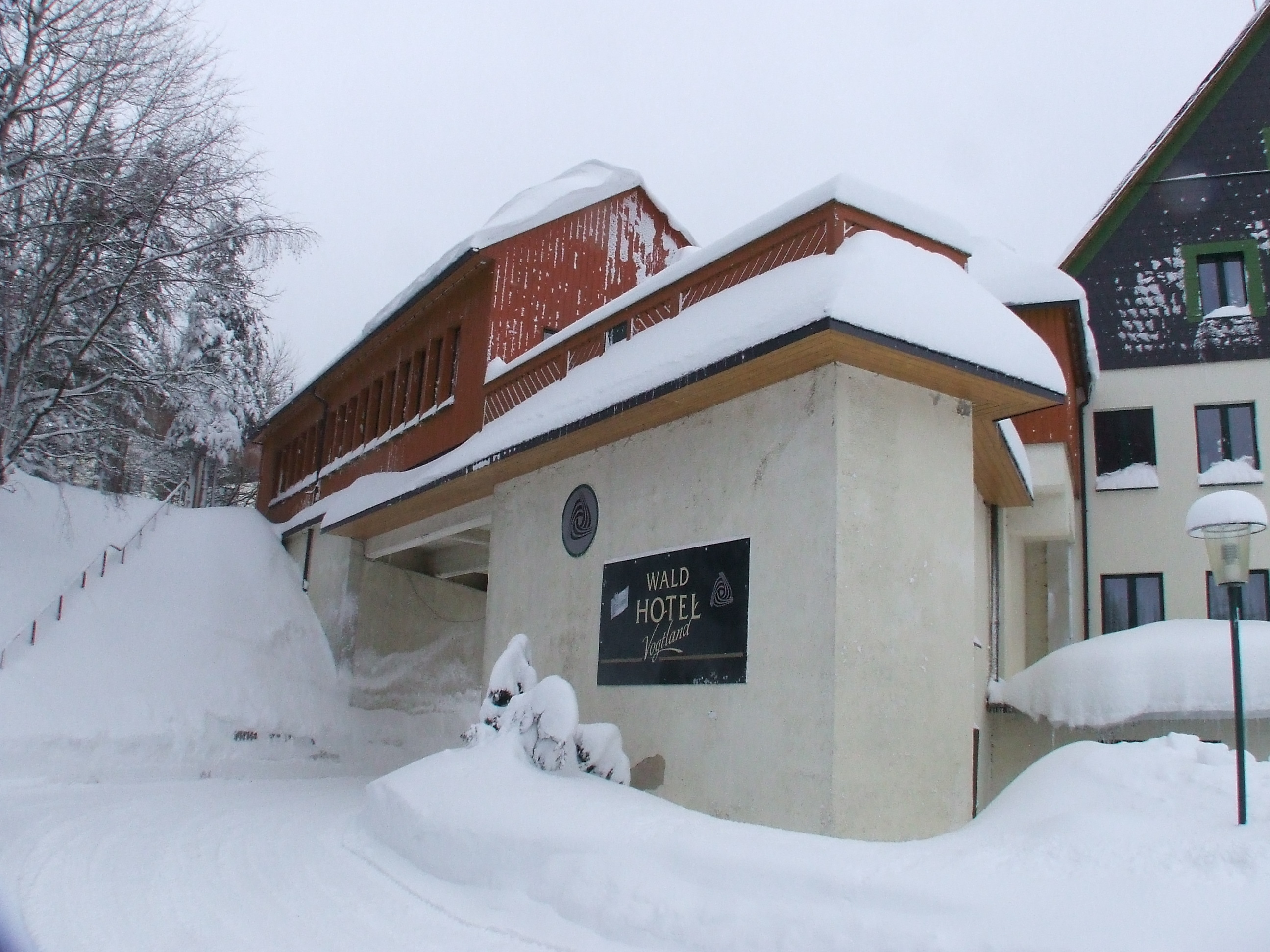 Zinnerzgrube Tannenberg - Mühlleithen